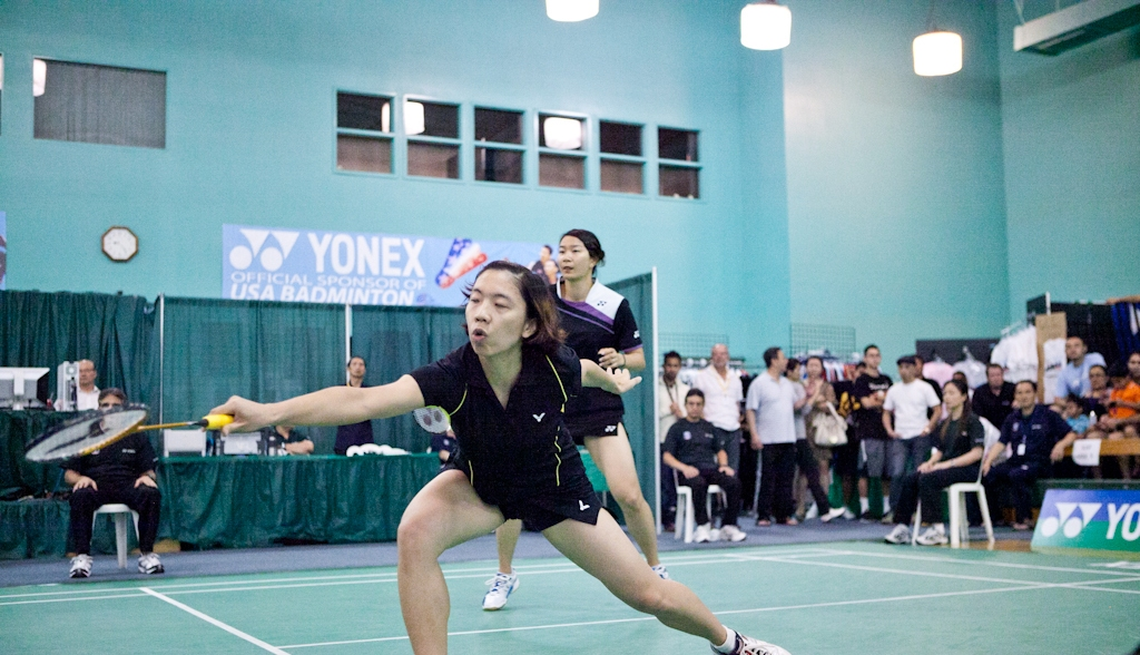 Cheng Wen-Hsing and Chien Yu-Chin